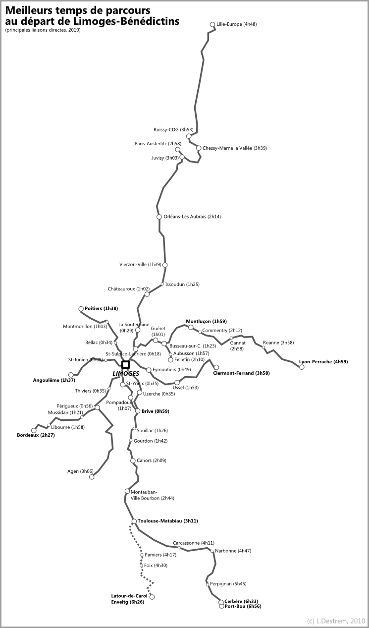 Meilleurs temps de parcours au départ de Limoges-Bénédictins (principales liaisons directes)